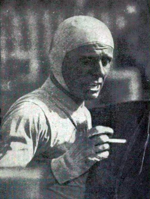 Achille Varzi, vainqueur du Grand Prix de Nice 1934.